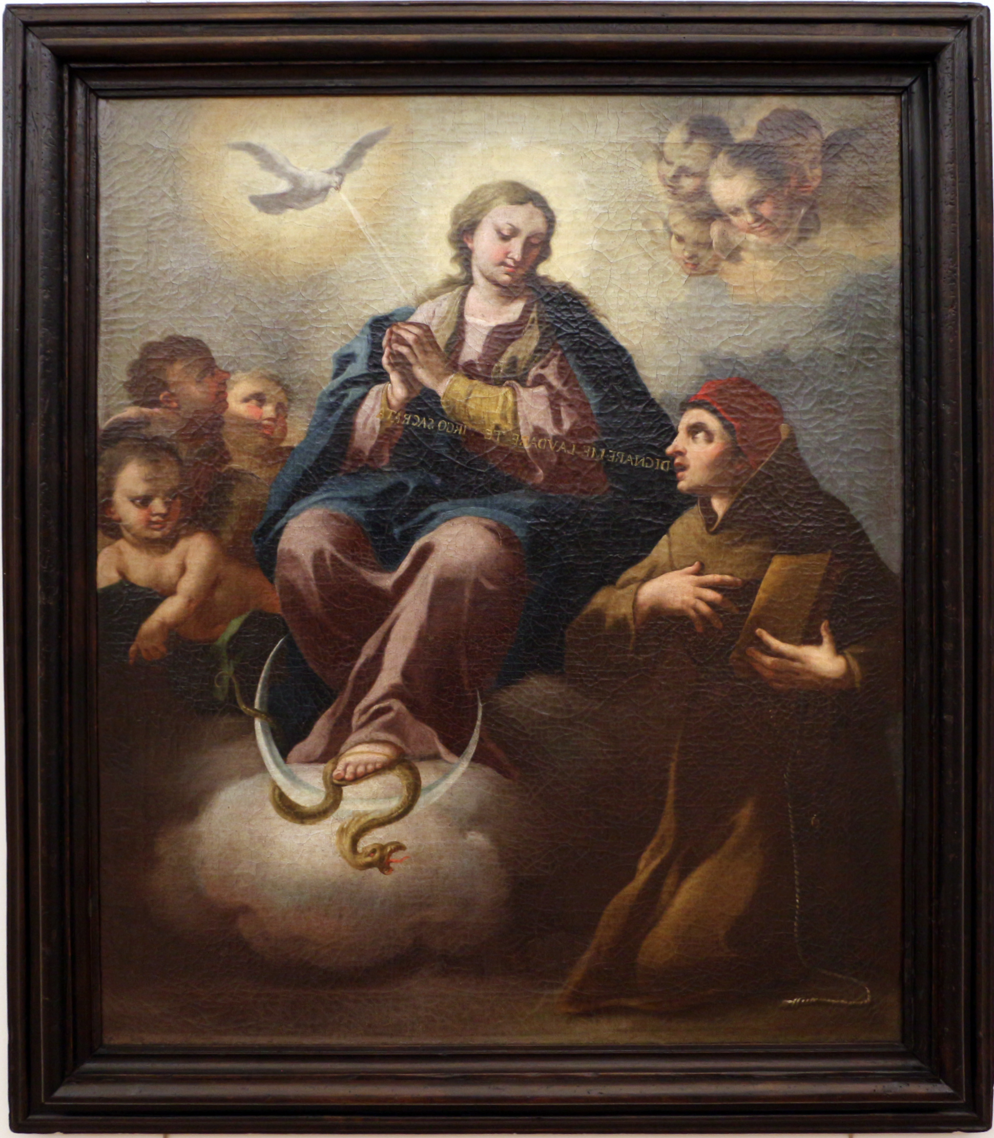 intercessione del beato duns scoto alla vergine immacolatatitle QS:P1476,it:"intercessione del beato duns scoto alla vergine immacolata" label QS:Lit,"intercessione del beato duns scoto alla vergine immacolata"